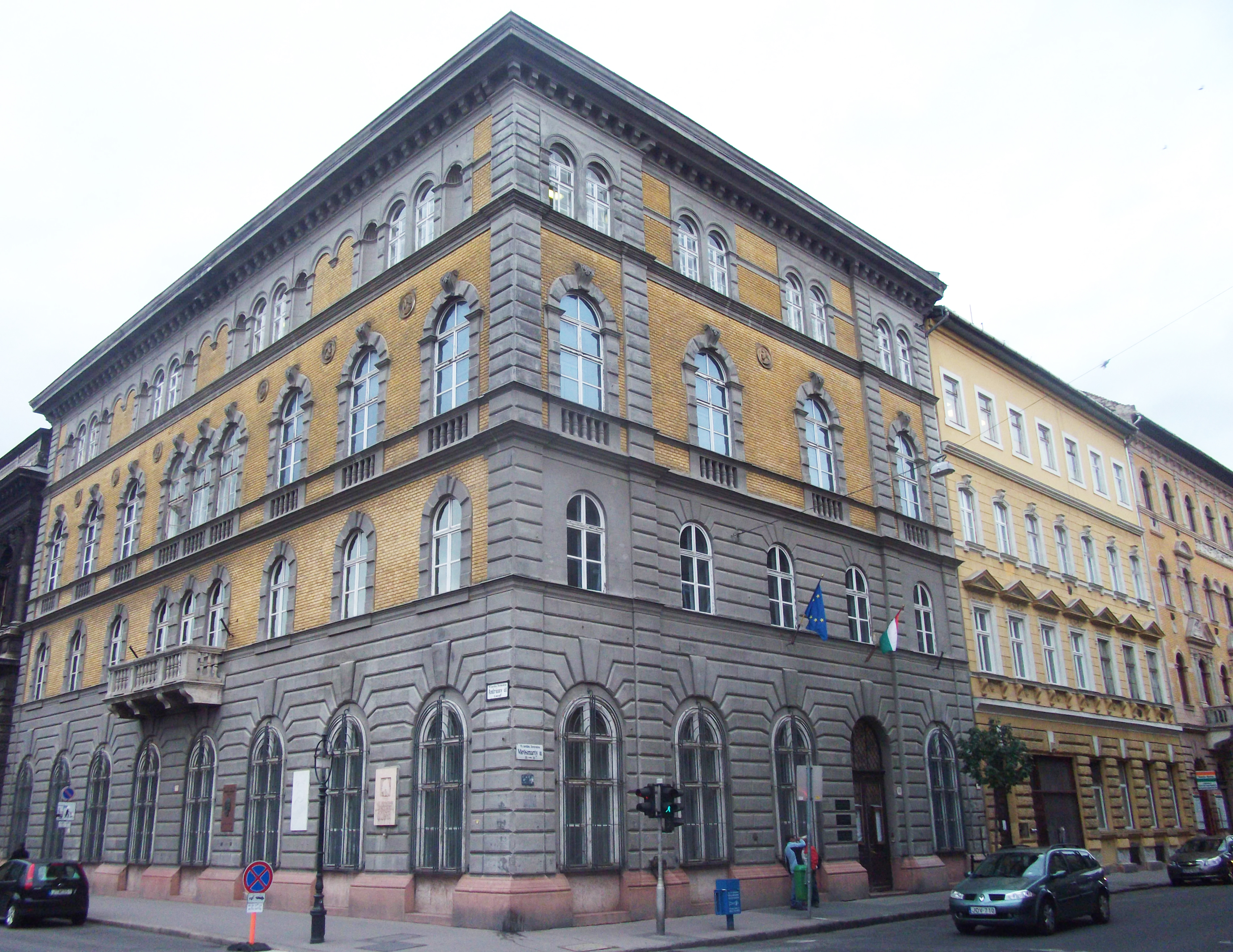 régi Zeneakadémia This is a photo of a monument in Hungary. Identifier: 711